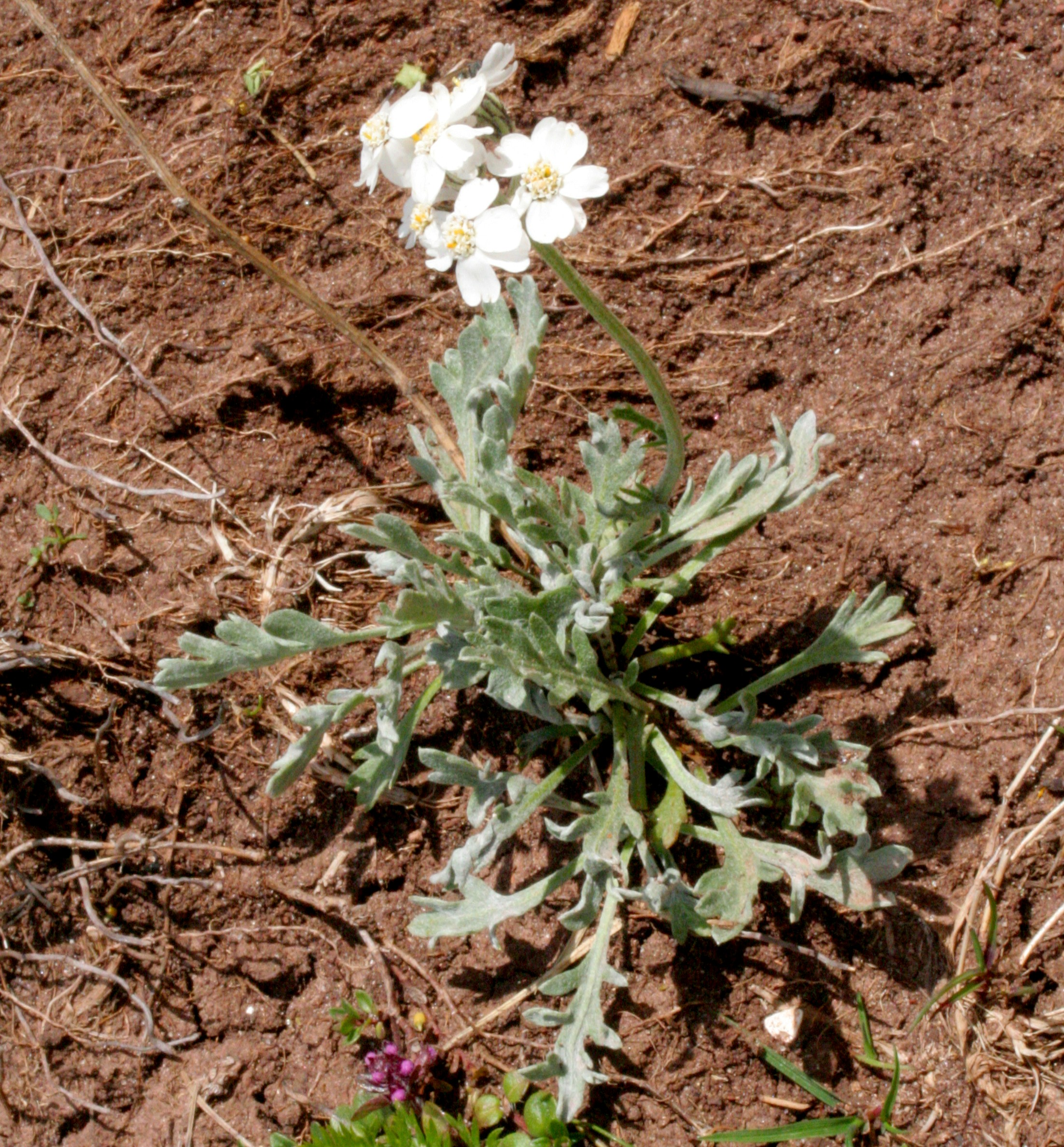 Località: Passo di Falzarego, Cortina (BL), 2105 m s.l.m.